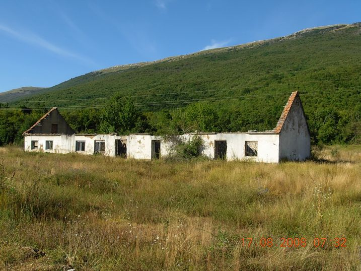 Снимак Основне школе у Прову Начинјен 2008. год. Аутор фотографије Миле Попарић